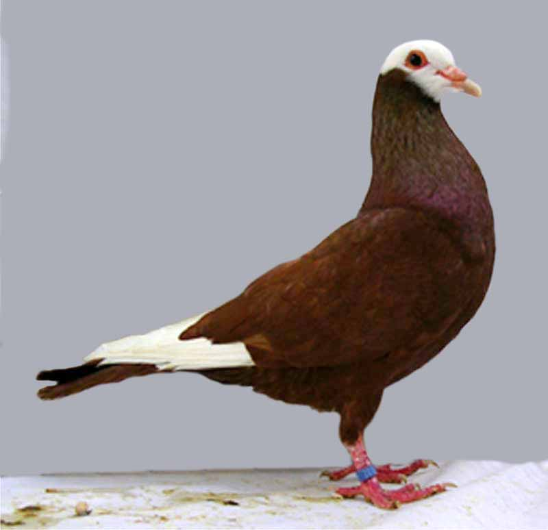 Gier Pigeon (Red Bald)